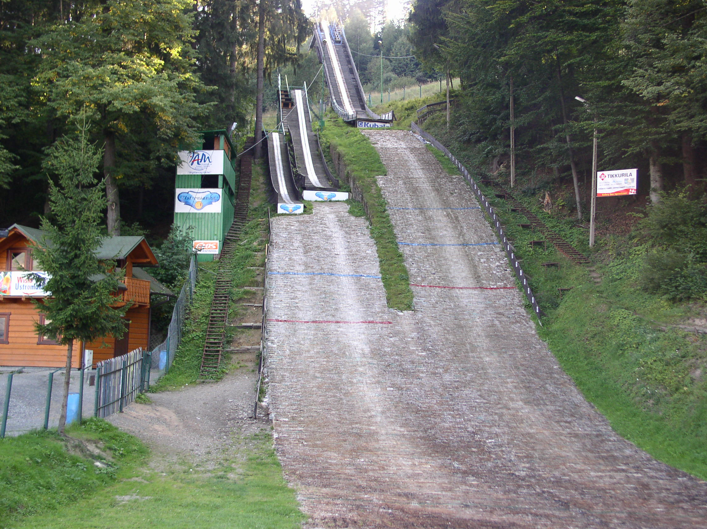 Wisła - skocznie Centrum. Autor: Walther, 2004